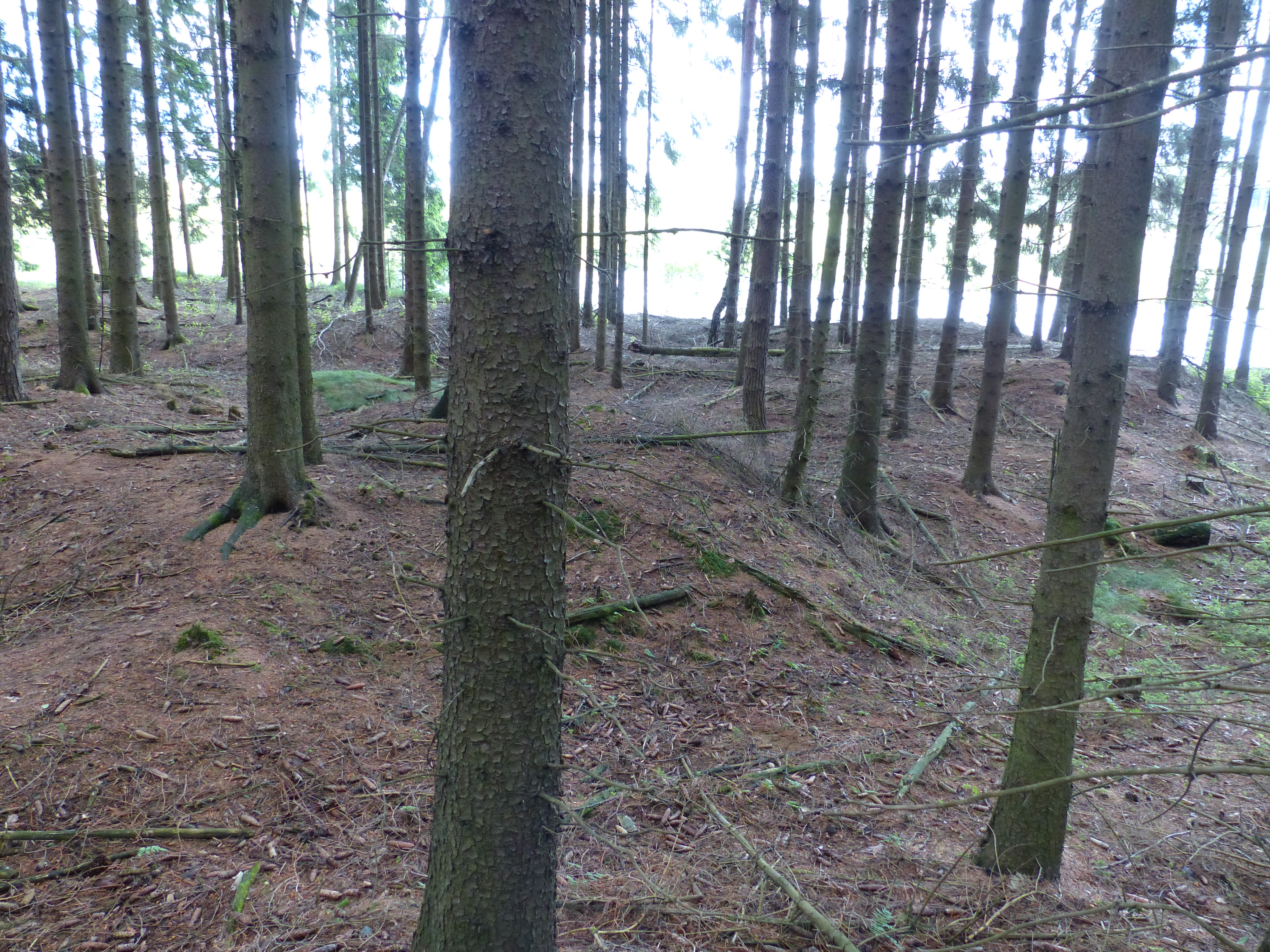 Mittelalterliches Waschhügelfeld unterhalb von Oppenroth